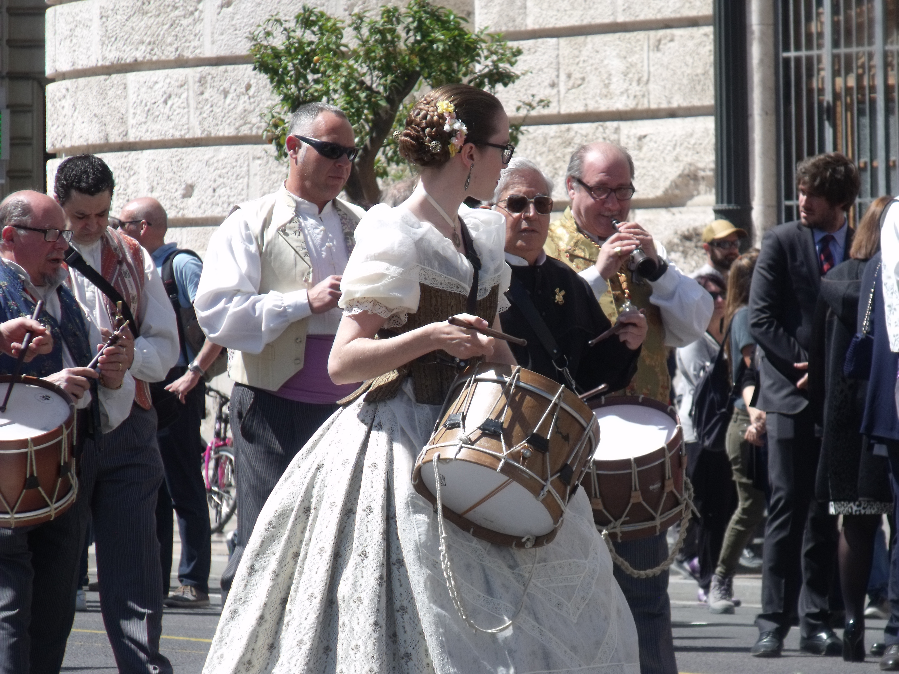 Procesión Cívica de san Vicente Ferrer año 2017 This is a photography of a Folklore festival in Spain (Wikidata id Q5861379).